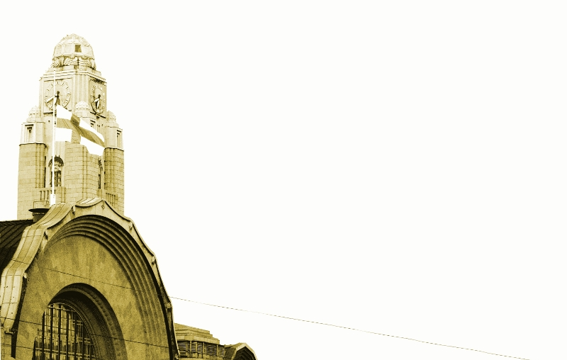 Suruliputus Helsingin rautatieasemalla Kauhajoen tapahtumien jälkeisenä päivänä, syyskuu 2008.